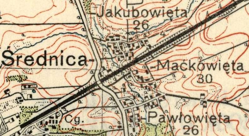 Jest to fragment mapy Wysokie Mazowieckie Pas 37 Słup 35. Skala 1: 100 000 Wojskowy Instytut Geograficzny z 1935 r.